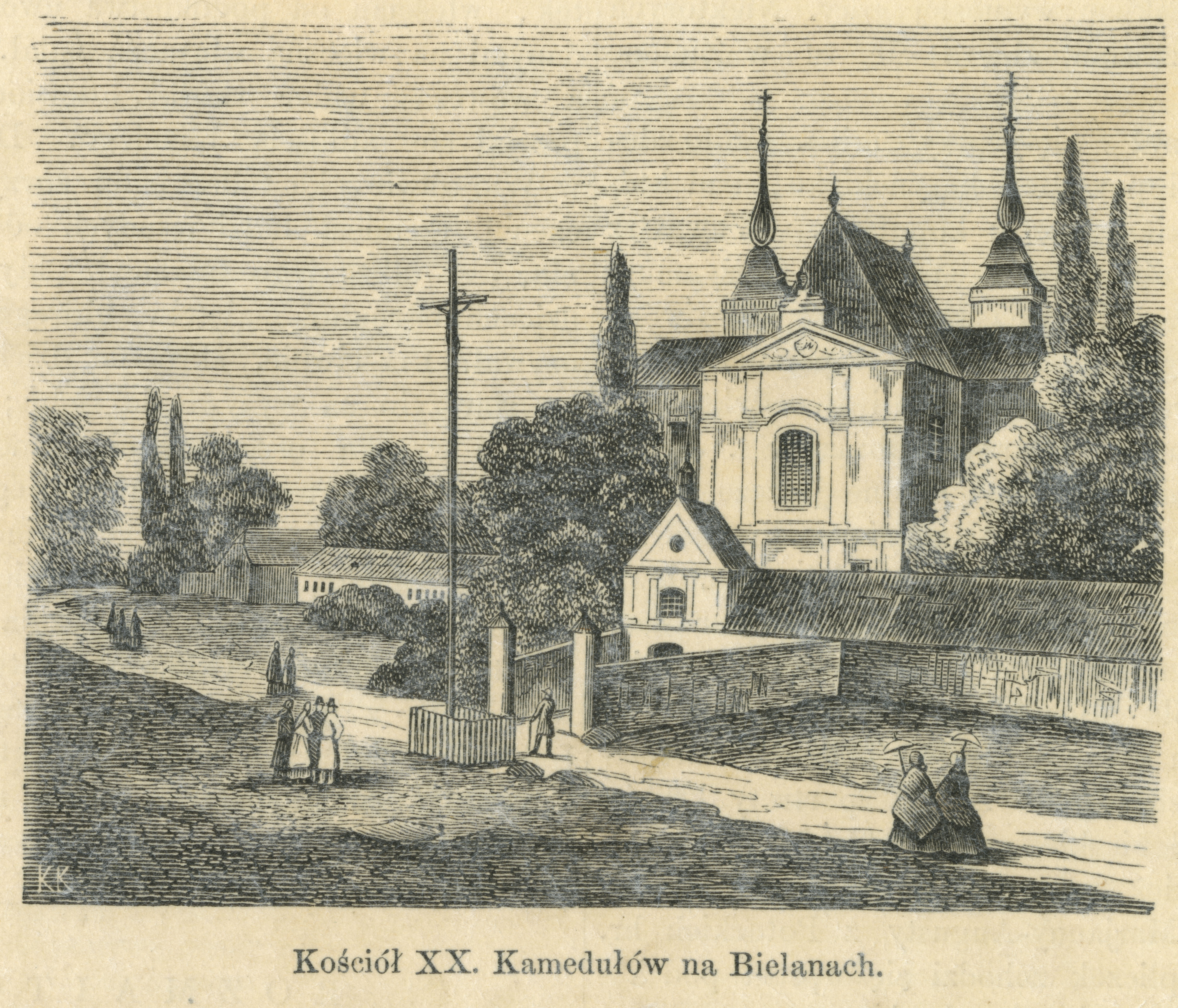 Kościół xx Kamedułów na Bielanach